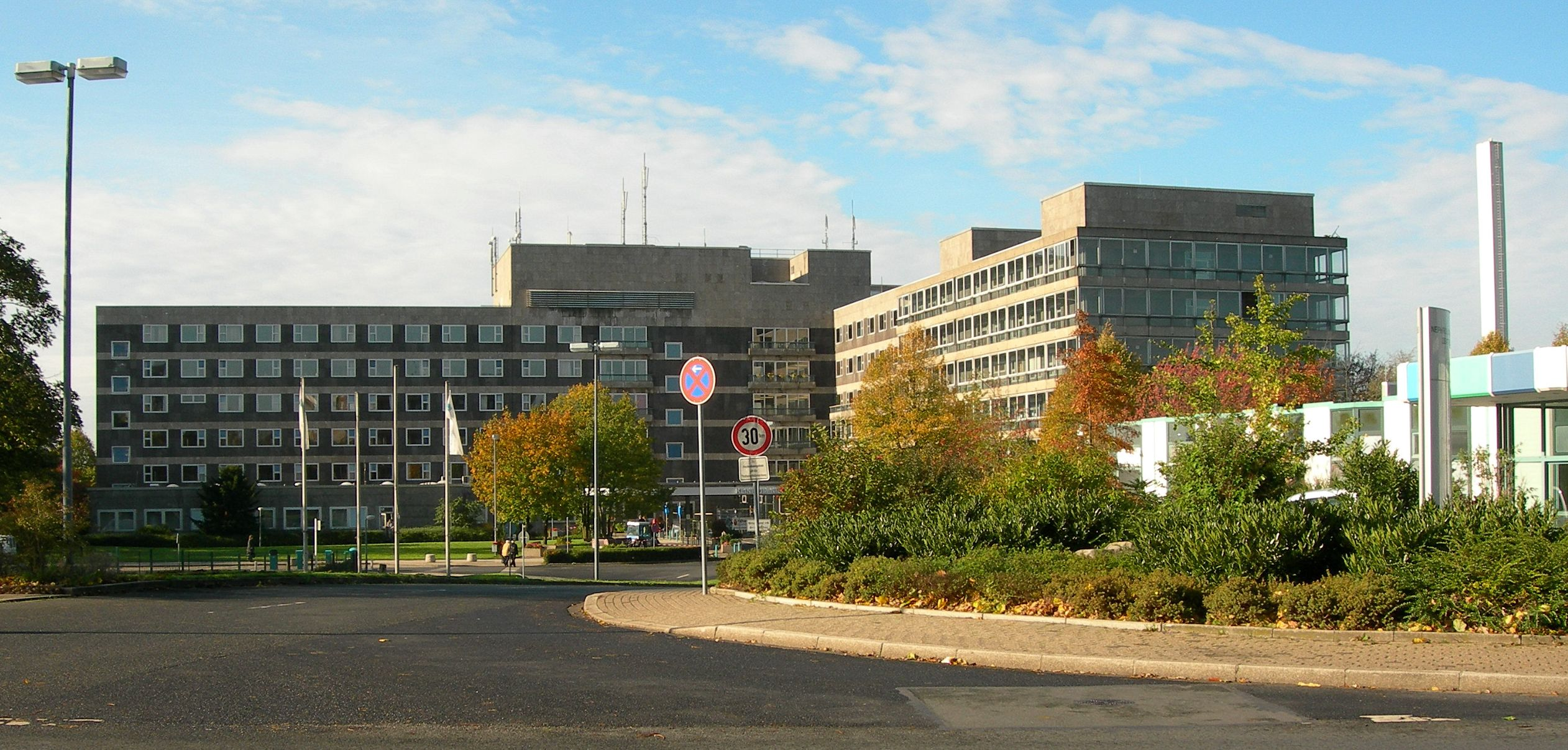 Klinikum Niederberg, Velbert-Losenburg, Hospital